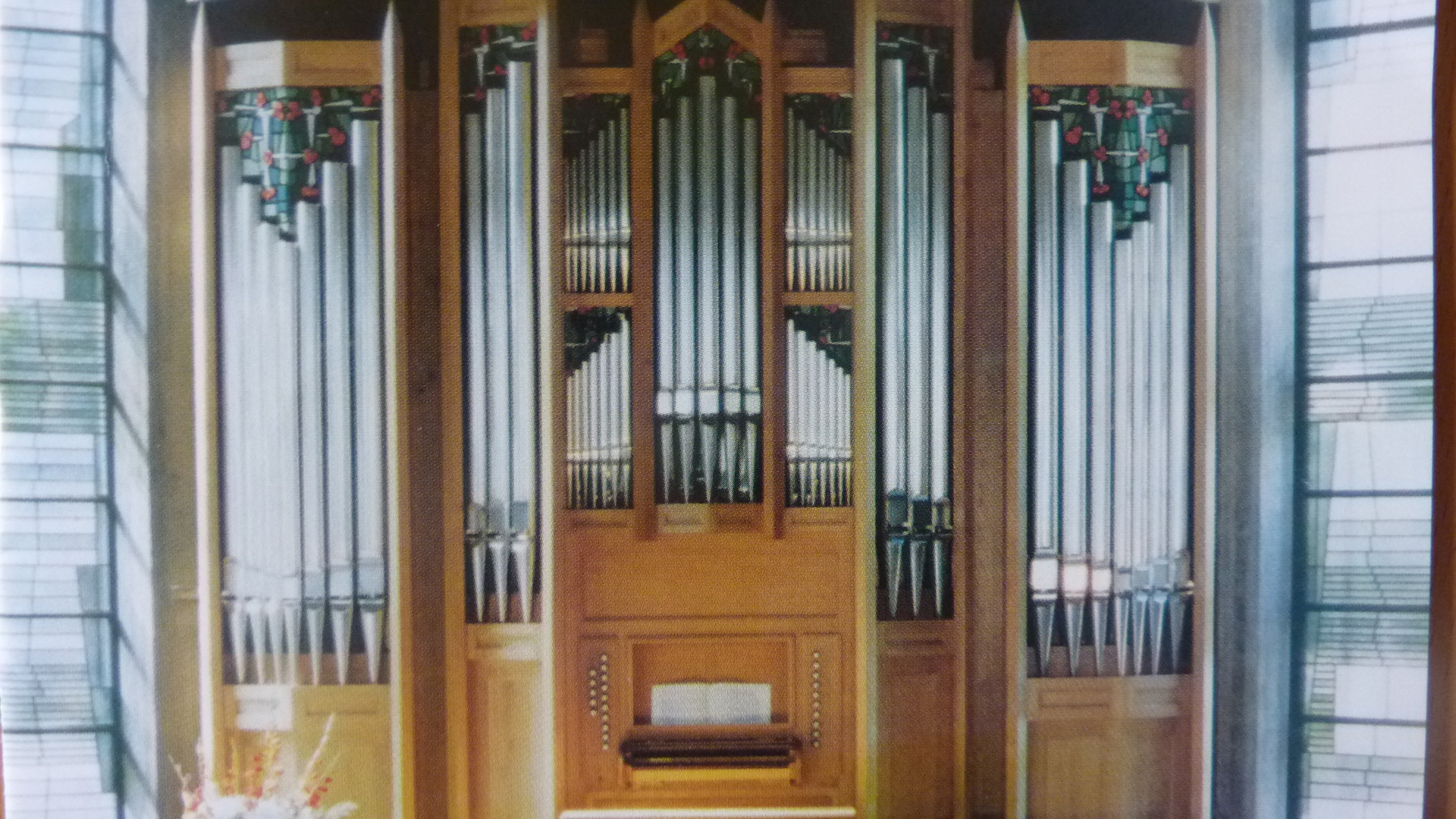 Orgel der St. Anna-Kirche Davensberg